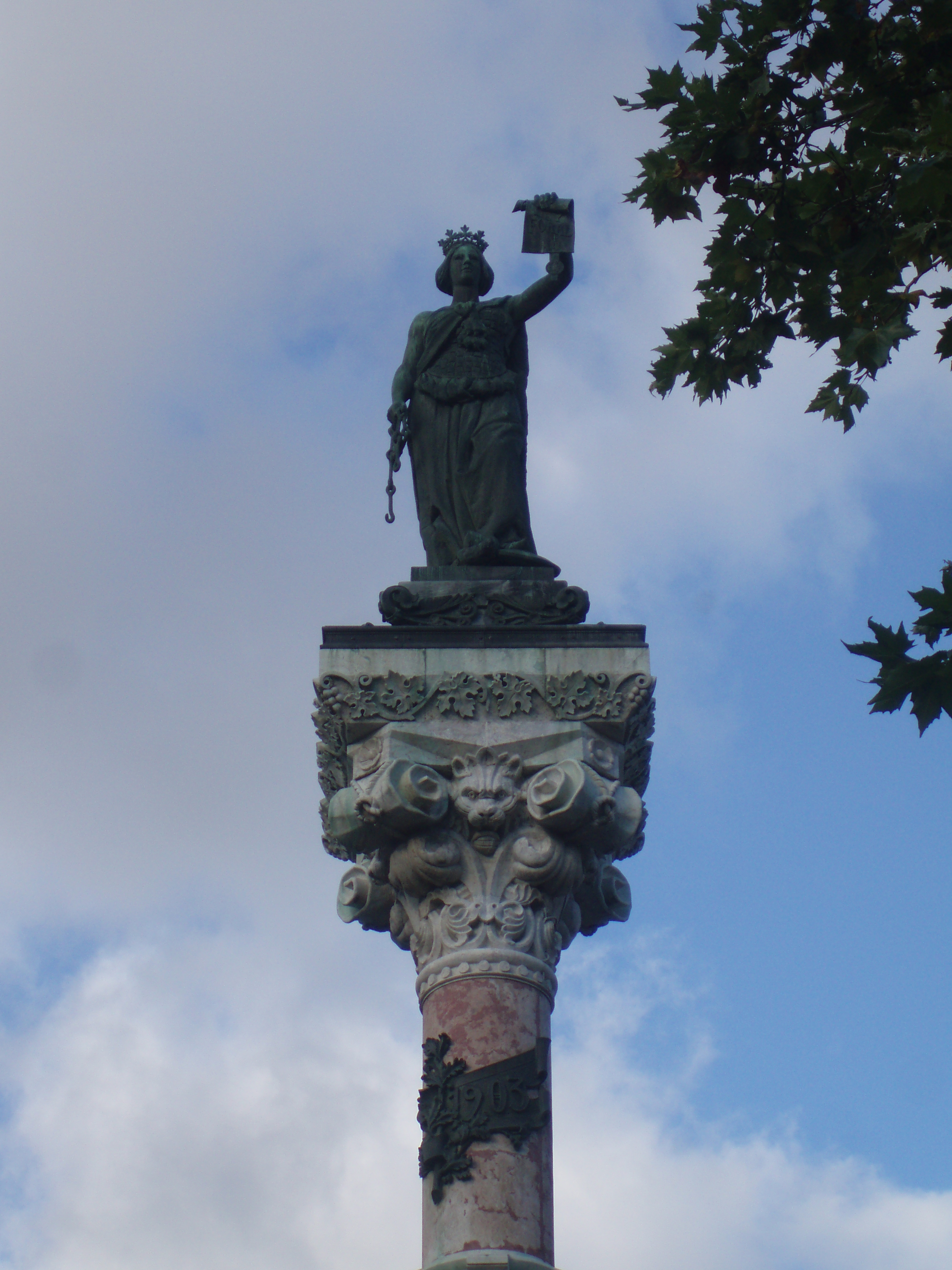 Monumento a los Fueros de Navarra en la ciudad de Pamplona. Navarra, (España).